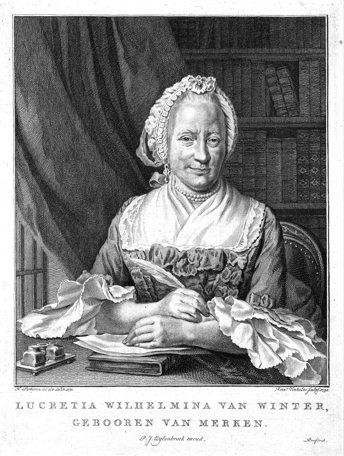 Portrait de Lucretia Wilhelmina van Merken (1721-1789), dessiné par H. Pothoven en 1771, gravé par Reinier Vinkeles en 1792, tiré du De waare geluksbedeeling (La vraie dispensation du bonheur).